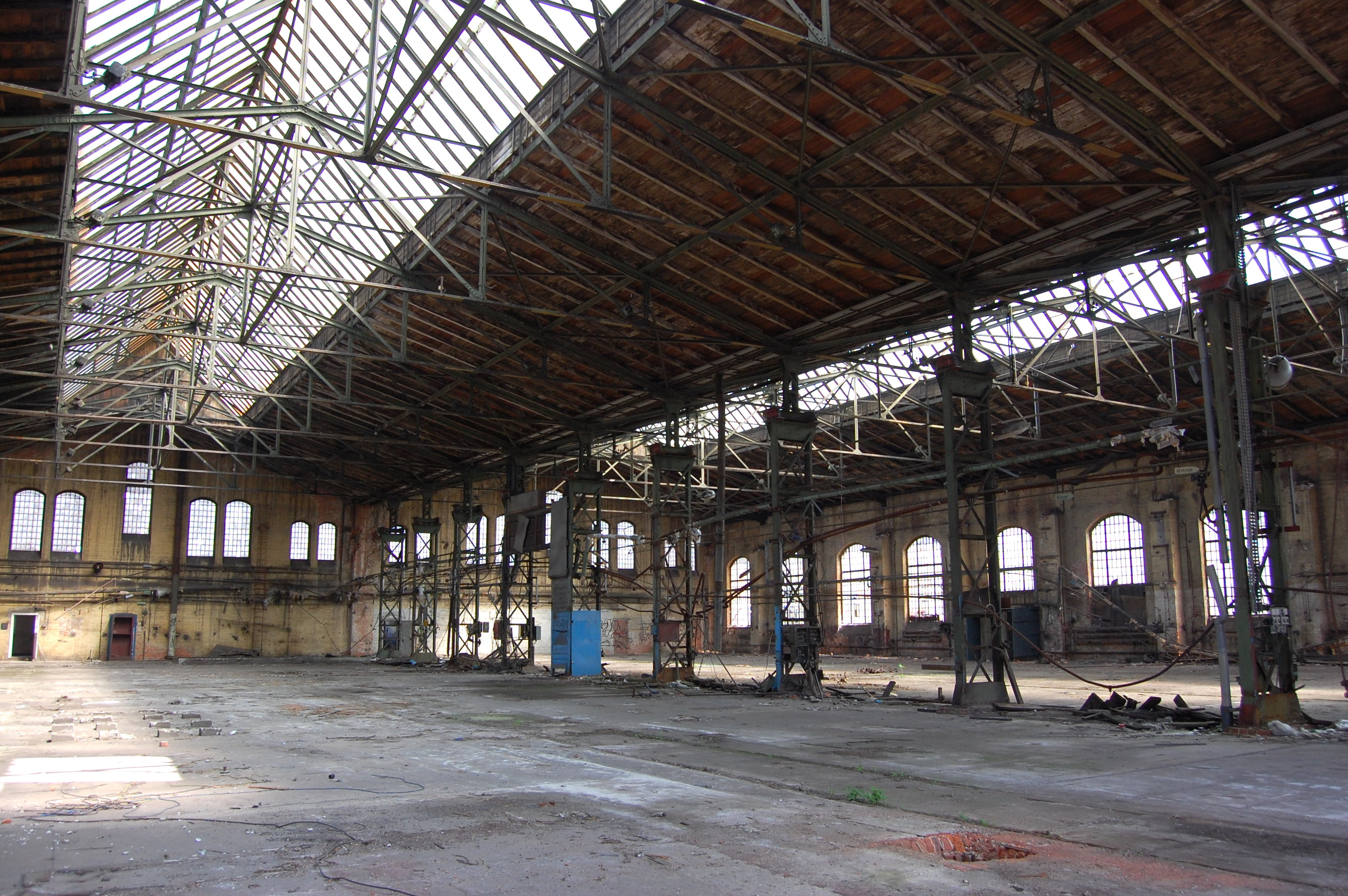 ehemalige Weichenbauanstalt des RAW Magdeburg-Salbke, Innenansicht